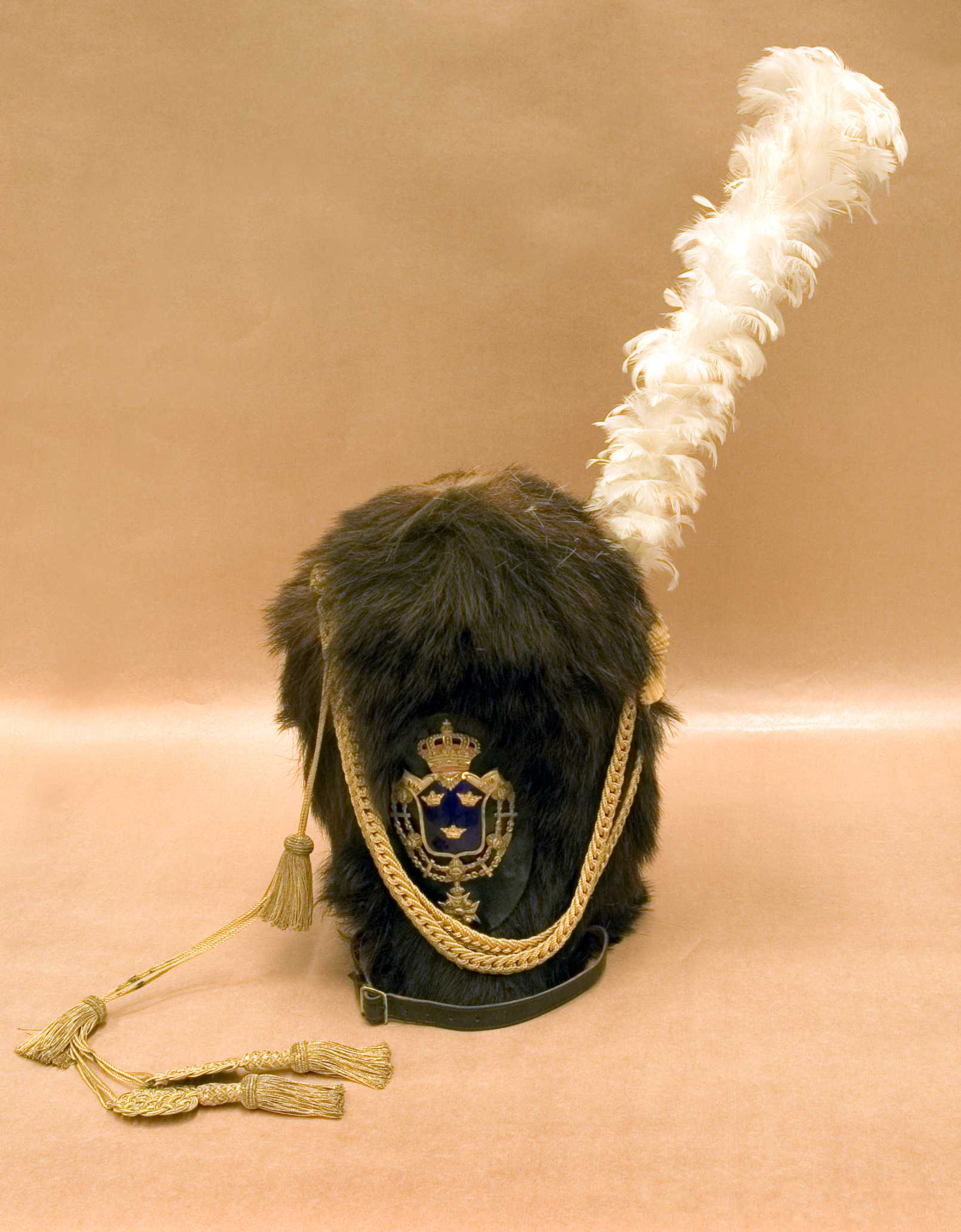 Grenadjärmössa m/1823-1824 för officer vid Svea livgarde (I 1). Armémuseums identifikationsnr: AM.093300